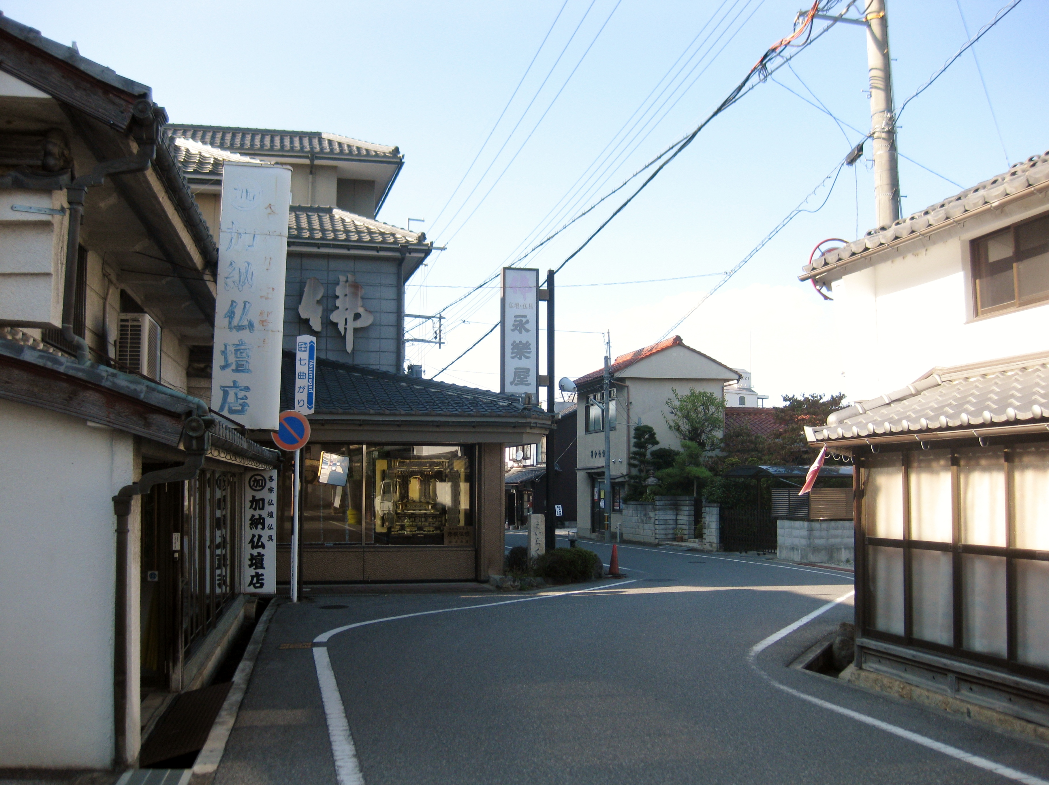 滋賀県彦根市七曲がりの町並み。